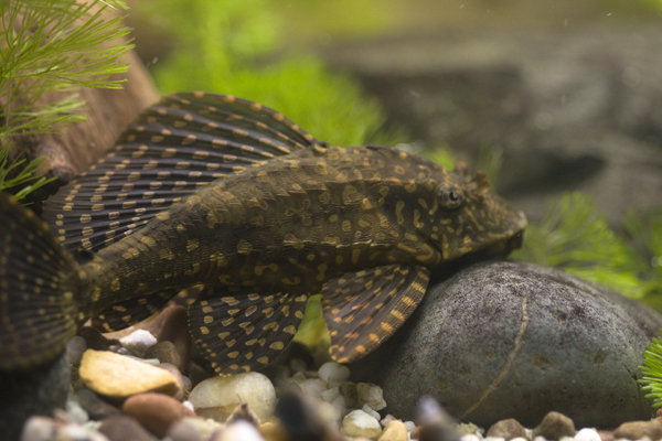 Pterygoplichthys joselimaianus